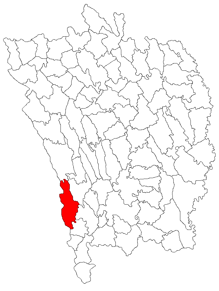 Categorie:Hărţi ale judeţului Vaslui